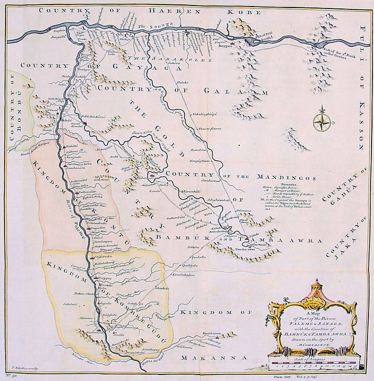 "Carte Du Cours Des Rivieres De Faleme Et Sanaga", Paris: Chez Didot, 1747; dans A.F. Prevost, Histoire Générale Des Voyages, Tome II, n° 27, 1747 - Scale: 1:845,000 (Extrême Est du Sénégal et Mali : le long de la rivière Falémé et de la rivière "Sanaga". A l'ouest, le Boundou). cliquez pour agrandir